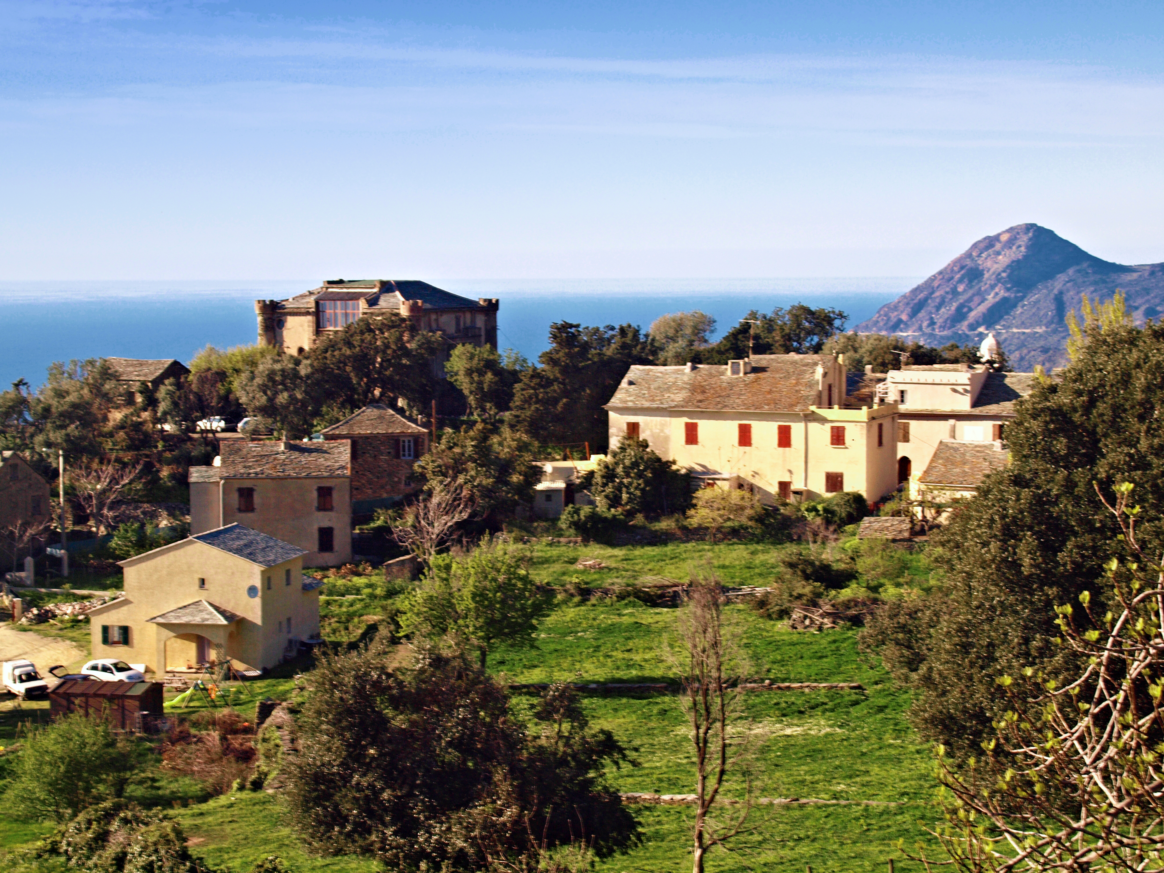 Canari (Corsica) - Château de Cenci à Piazza